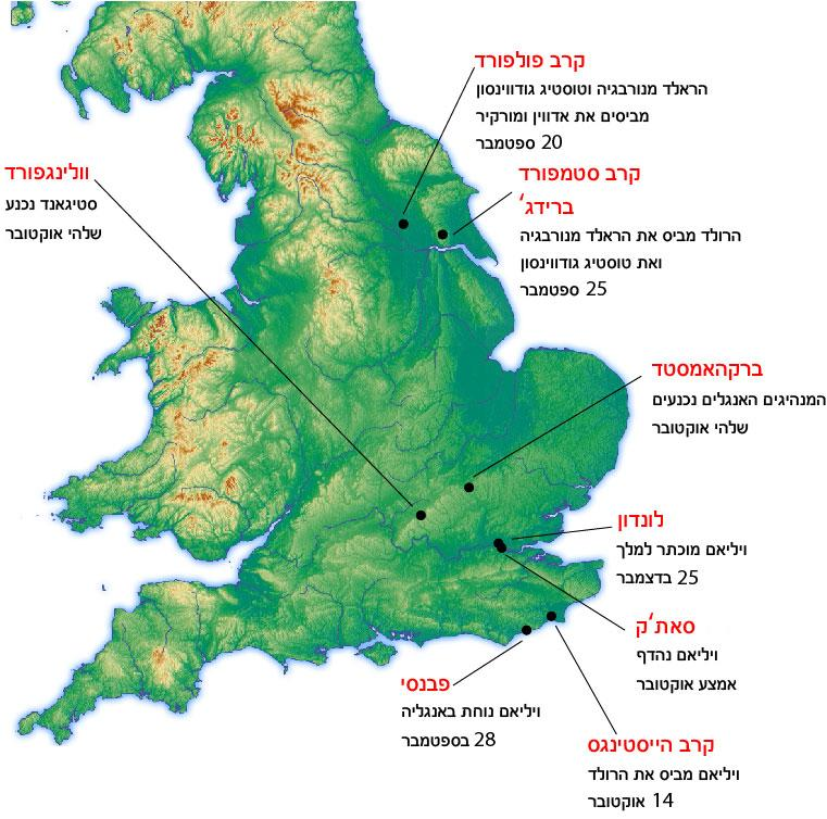 אירועים מרכזים בכיבוש הנורמני של אנגליה.